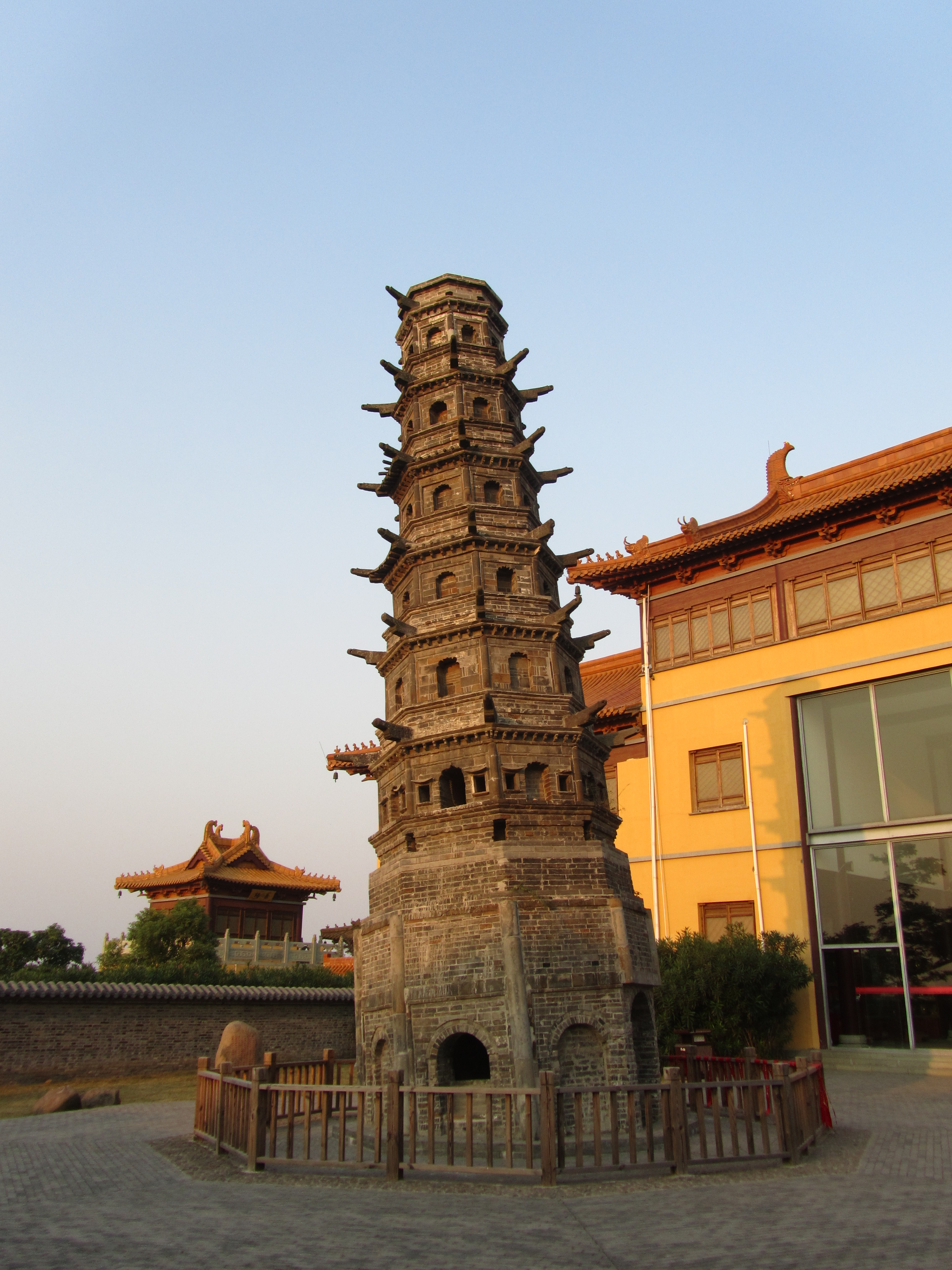 南京方山定林寺塔。